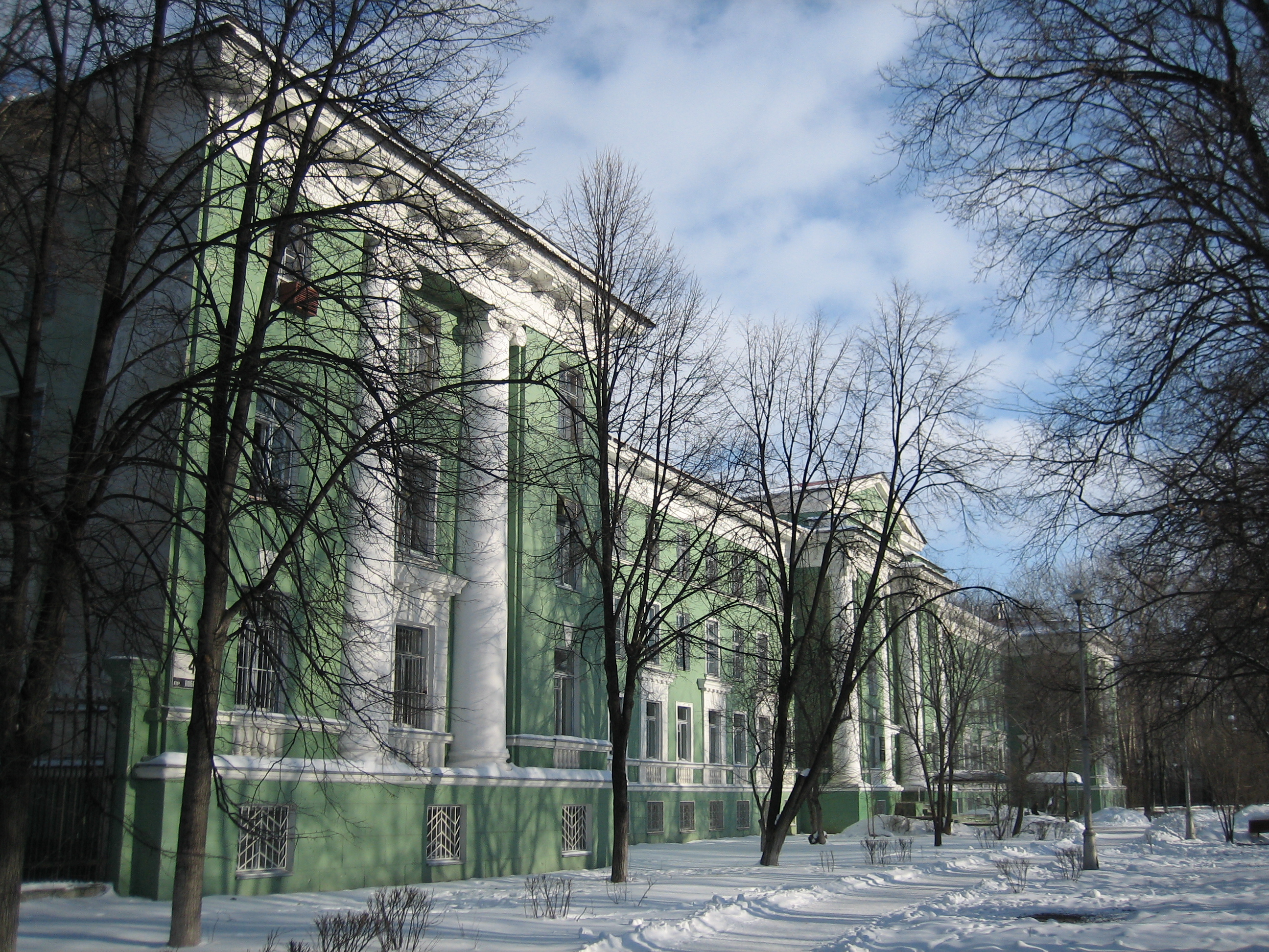 Здание филиала Московского инженерно-физического института. Проспект Победы, 48, Озерск, Челябинская область